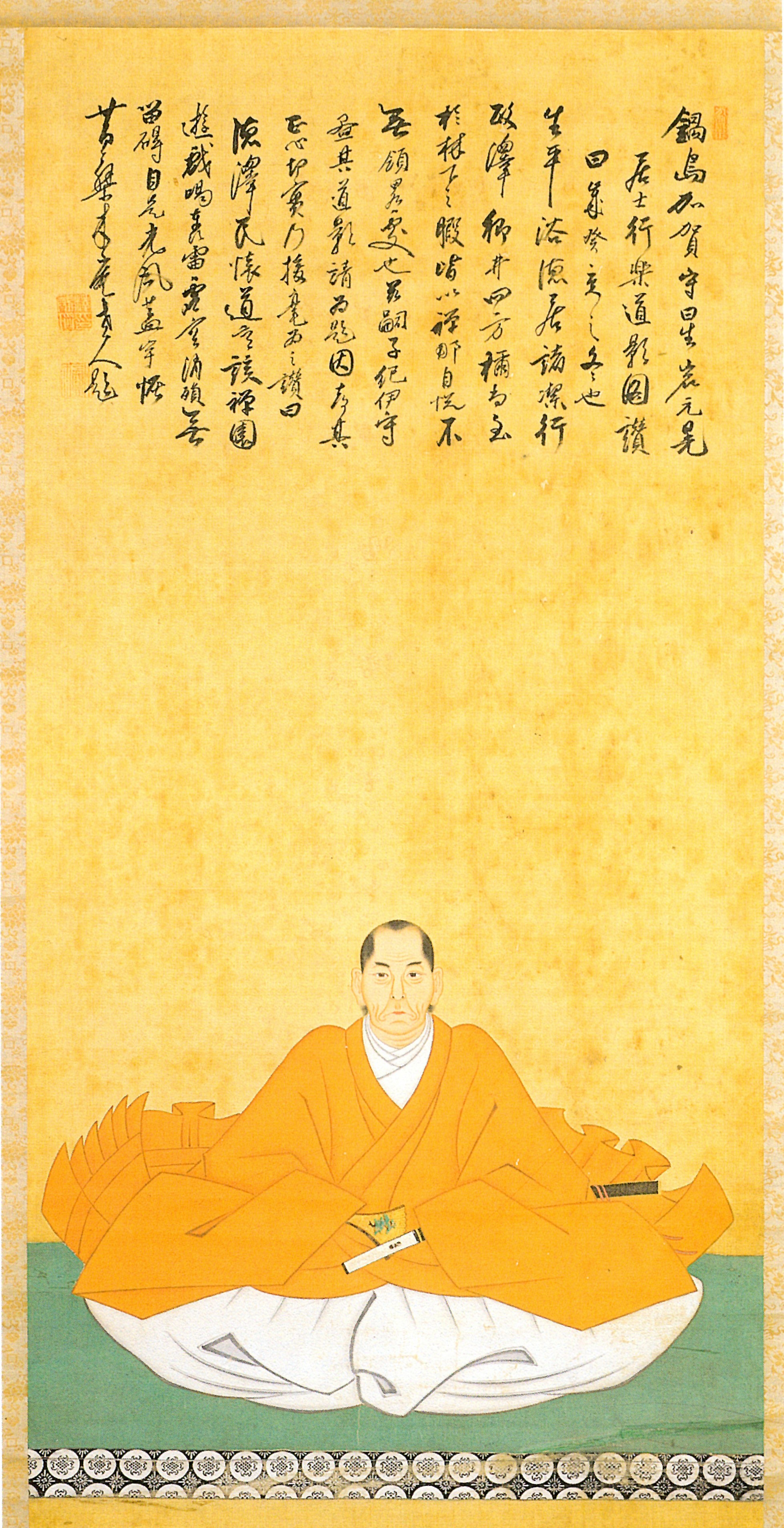 鍋島直能の肖像。